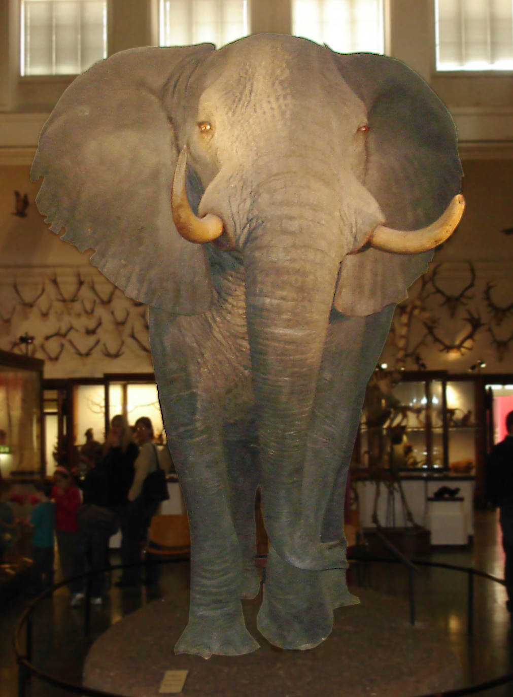 Elefant Naturhistoriska Museet Göteborg